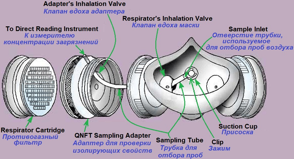 Схема экспериментального измерения эффективности противолгазного фильтра СИЗОД на рабочем месте, при использовании респиратора работником